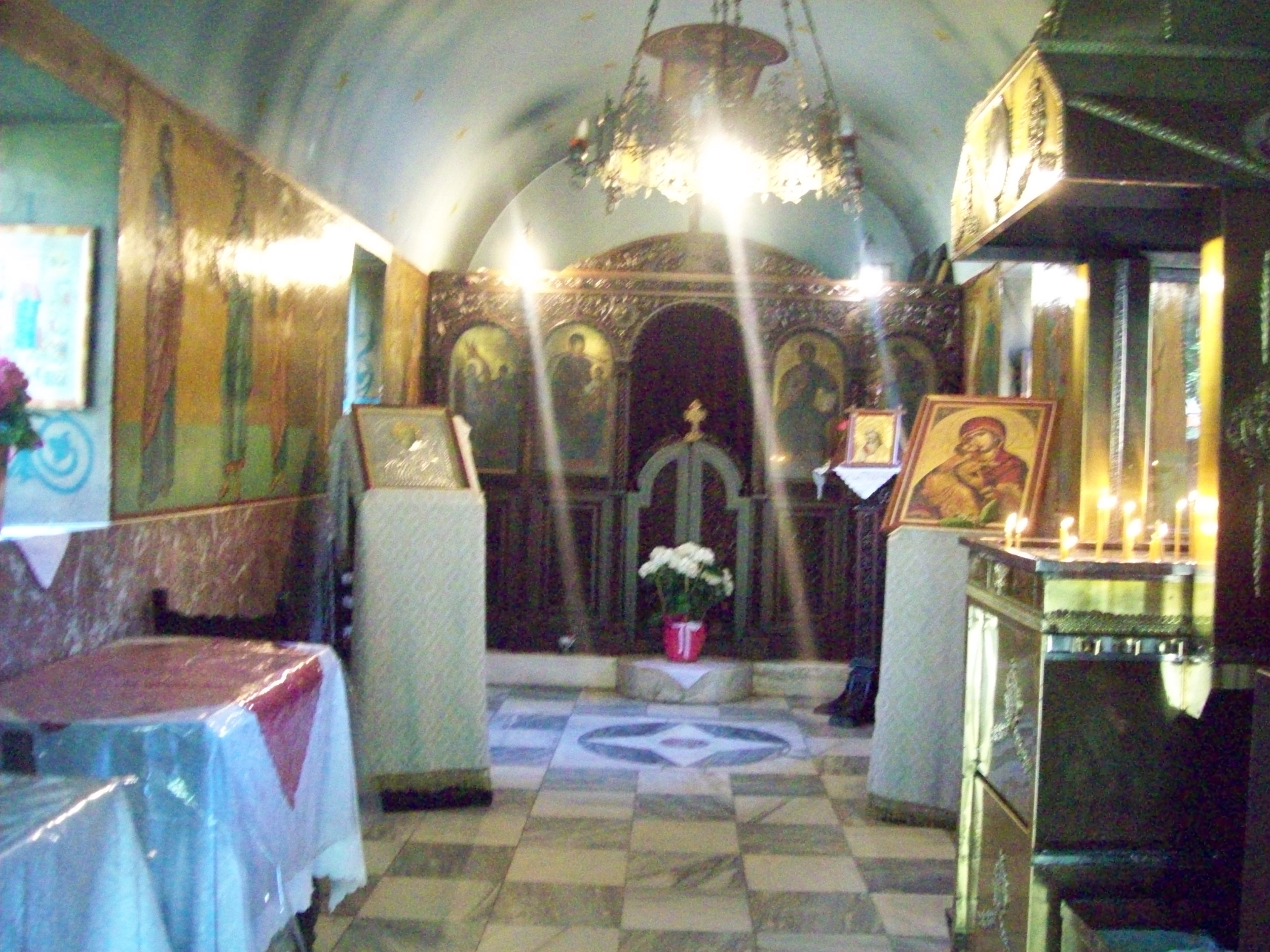 Το λιτό εσωτερικό του βυζαντινού ναΐσκου του Αγ. Ζαχαρία στην κεντρική πλατεία της Ελευσίνας